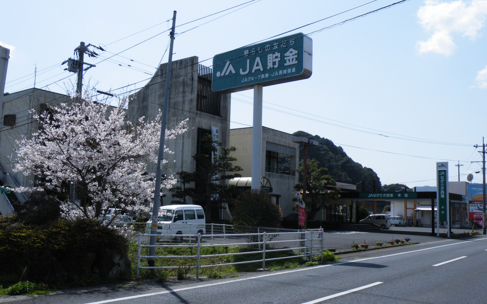 ながさき西海農業協同組合（JAながさき西海）本店：長崎県佐世保市吉井町